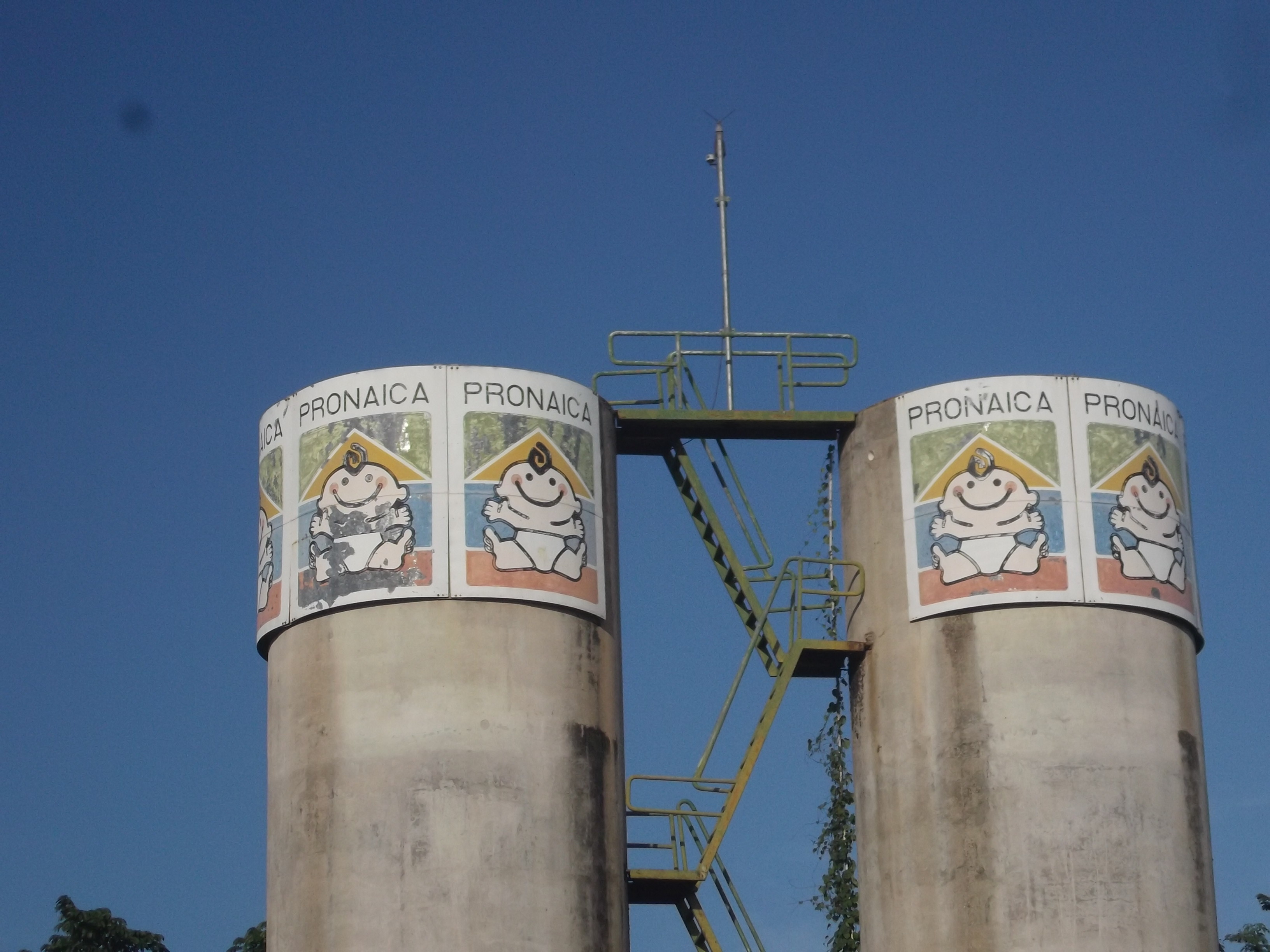 Vista do PRONAICA nas torres do Centro de Atenção Integral à Criança e ao Adolescente (CAIC) de Teresina.